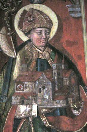 Darstellung des Heiligen Hariolfs, dem Gründer des Klosters Ellwangen. In seiner Hand ist die Stiftskirche St.Vitus dargestellt